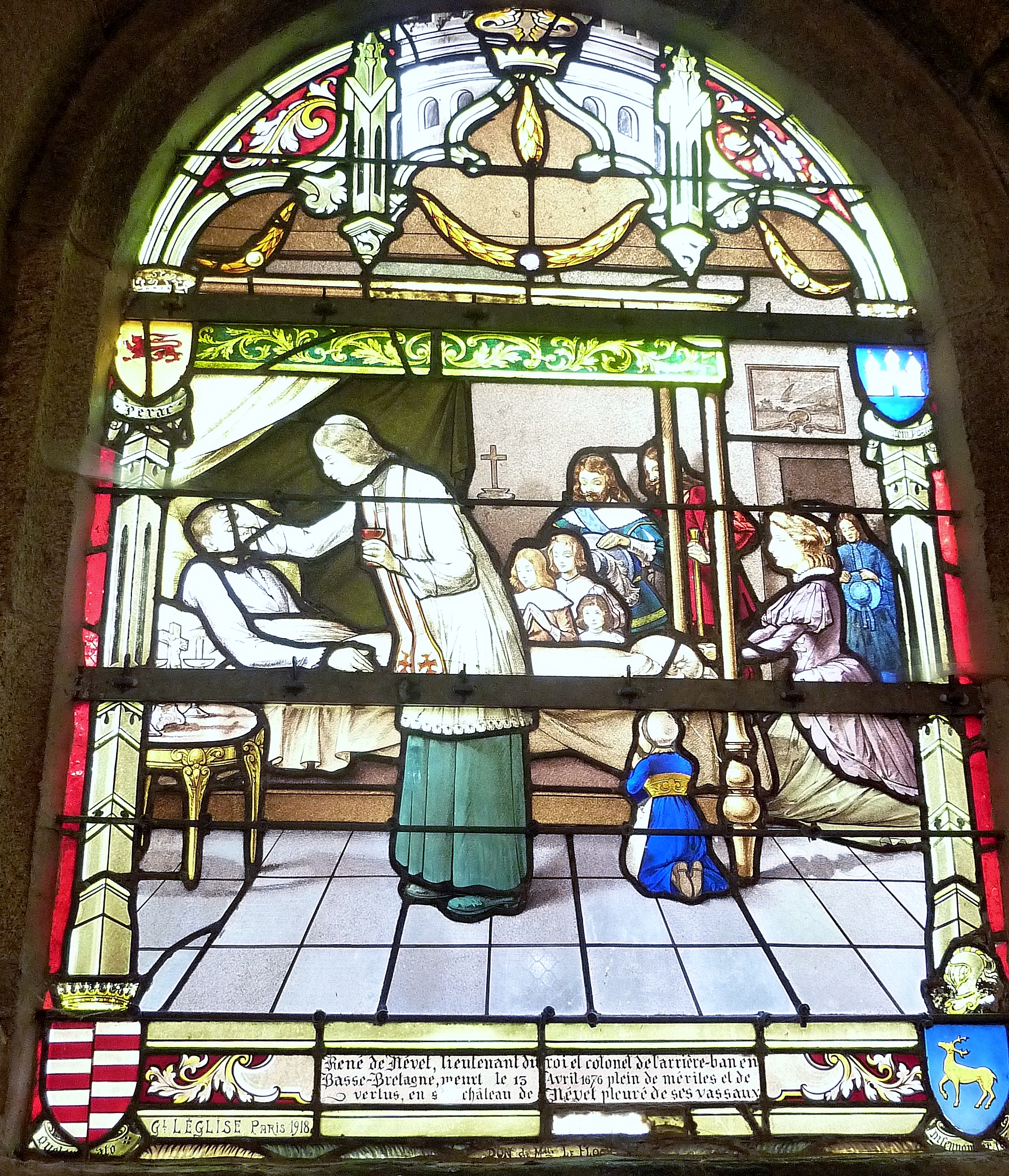 Kerlaz : église paroissiale Saint-Germain, vitrail de Gabriel Léglise représentant "René de Névet, lieutenant du roi et colonel de l'arrière-ban de Basse-Bretagne, meurt le 13 avril 1676, plein de mérites et de vertus, en son château de Névet, pleuré de ses vassaux".